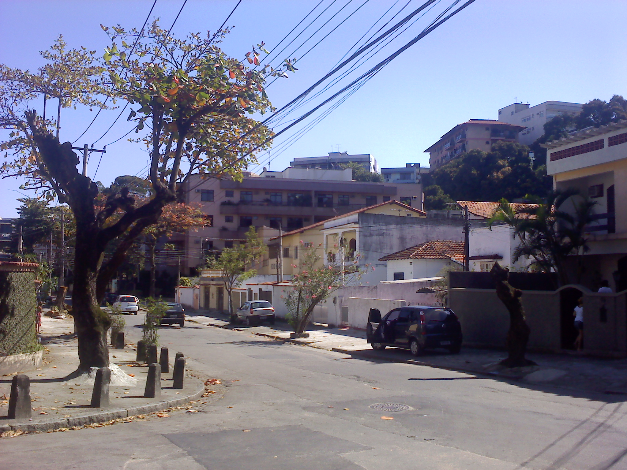 C:\Users\marcio\contacts\Documents\rua muiatuca.jpg